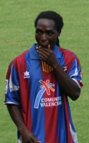 El jugador granota Mustapha Riga